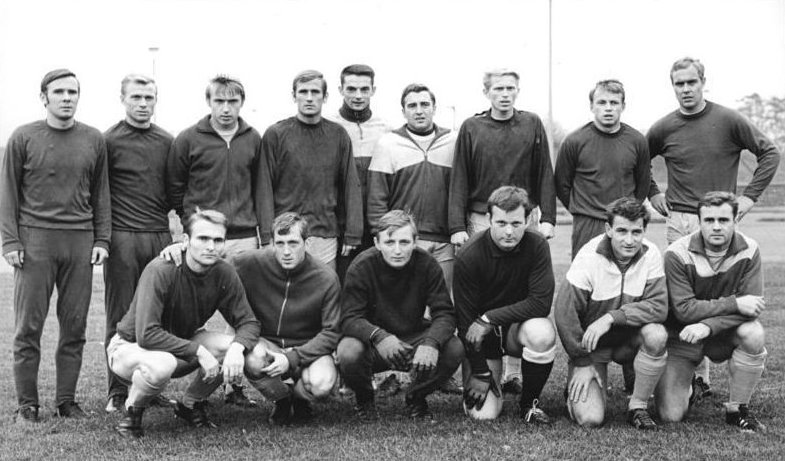 Zentralbild-Koard-12.12.69-ma-Rostock: DDR-Fußball-Oberligamannschaften. FC Hansa Rostock: Stehend v.l.n.r.: Jürgen Decker, Wolfgang Barthels, Joachim Streich, Herbert Pankau, Gerd Kostmann, Klaus-Peter Stein, Helmut Schükler, Lothar Hahn und Manfred Rump. Davor v.l.nr.: Klaus-Dieter Seehaus, Gerhard Brümmer, Dieter Schneider, Jürgen Heinsch, Helmut Hergesell und Gerd Sakritz.